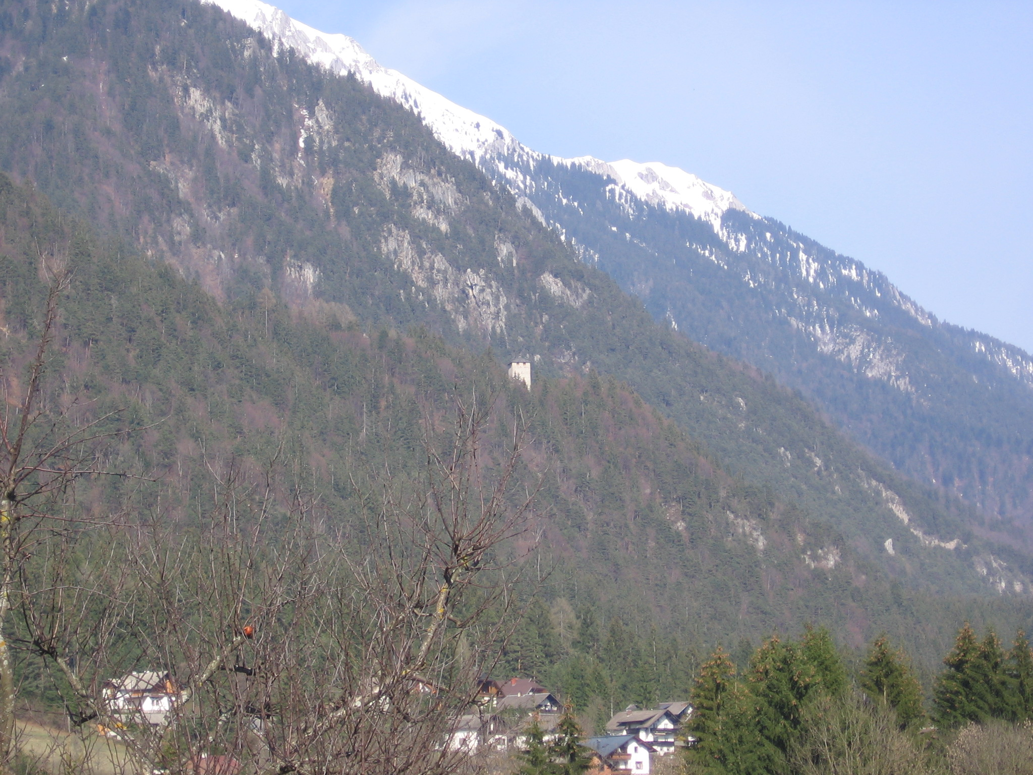 Burgruine Khünburg, Hermagor.